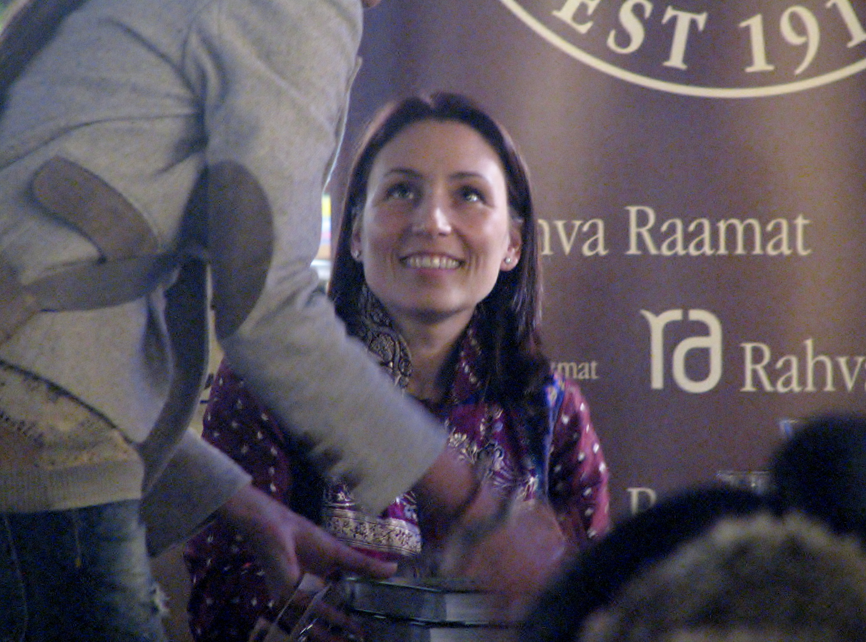 Merilen Mentaal oma raamatu "Aia kujundamine mõtetes ja praktikas" esitlusel autogramme jagamas Viru Keskuse Rahva Raamatu kaupluses